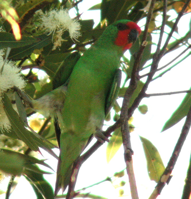 Little Lorikeet (Glossopsitta pusilla) Kobble Creek, SE Queensland